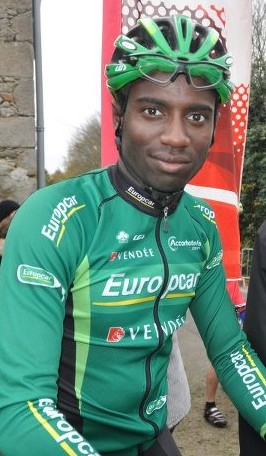 Kévin Réza